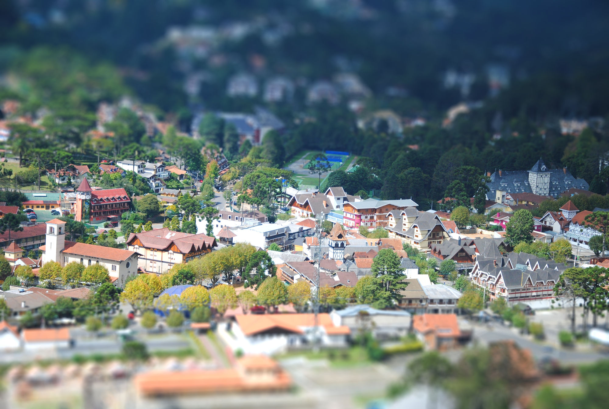 Campos do Jordão